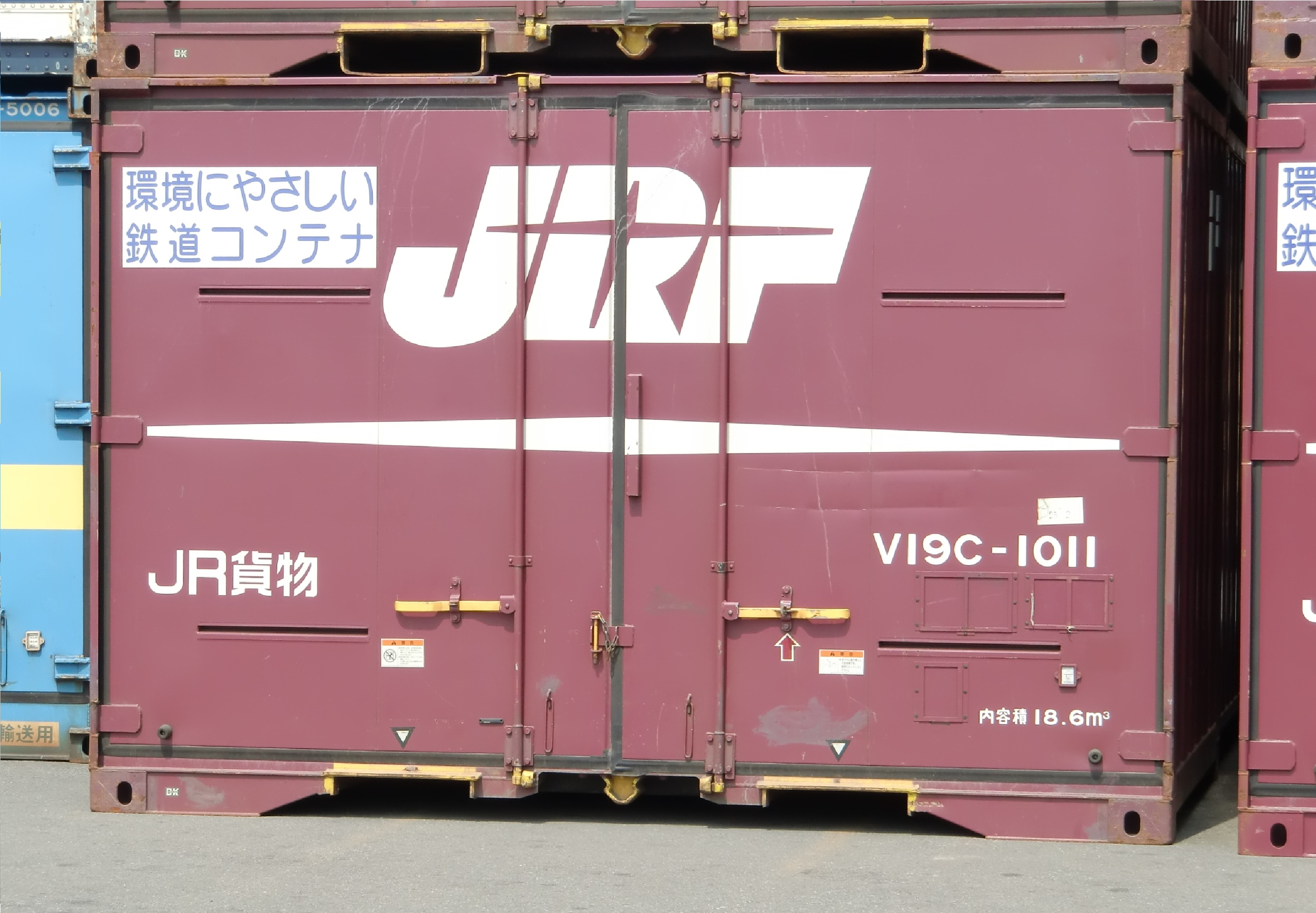 撮影地＝福岡(タ)